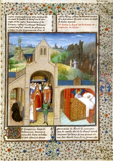 Vie de Lothaire